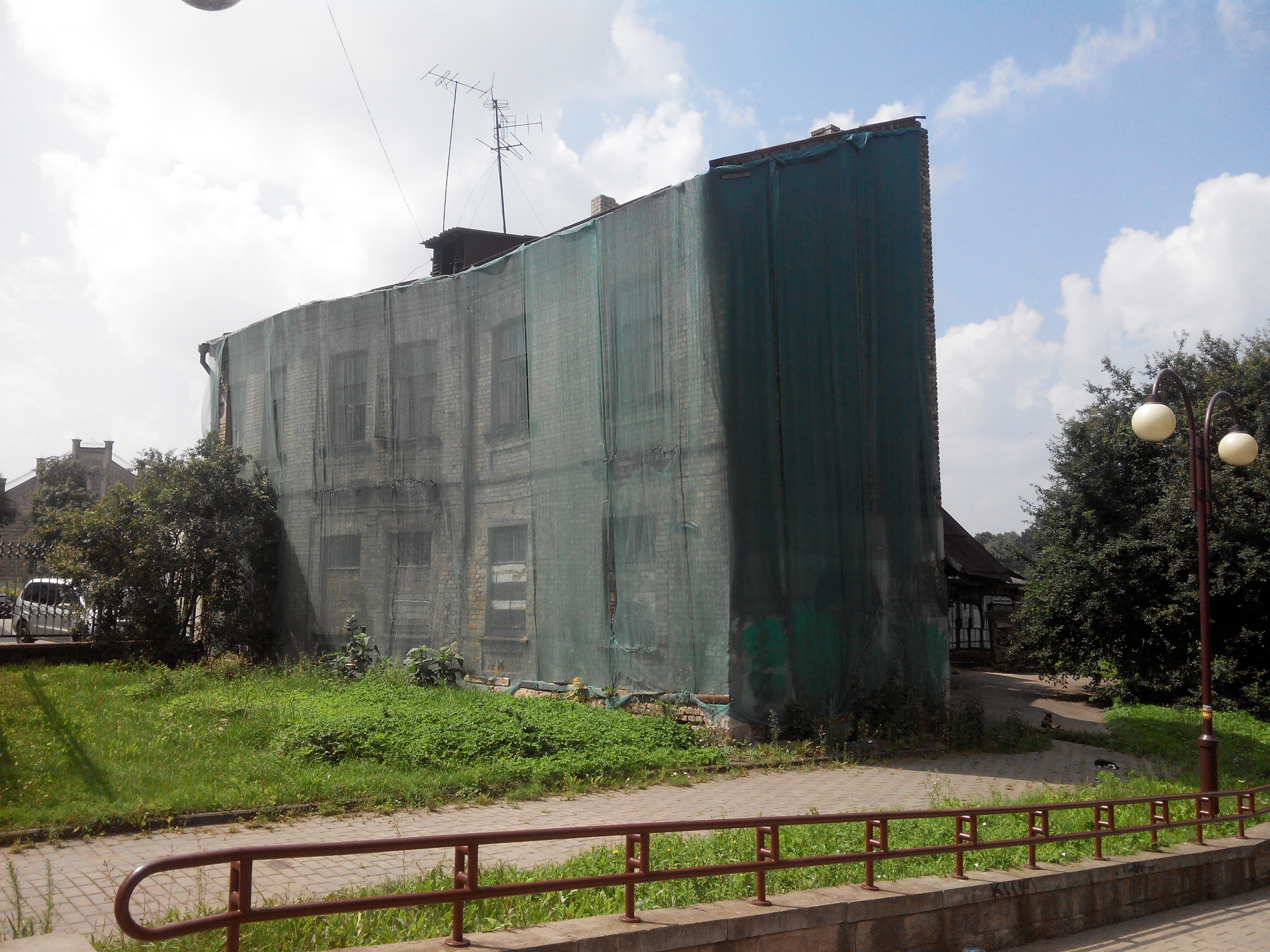 Будынак па вуліцы Вялікая Траецкая, 47, Гродна, Беларусь